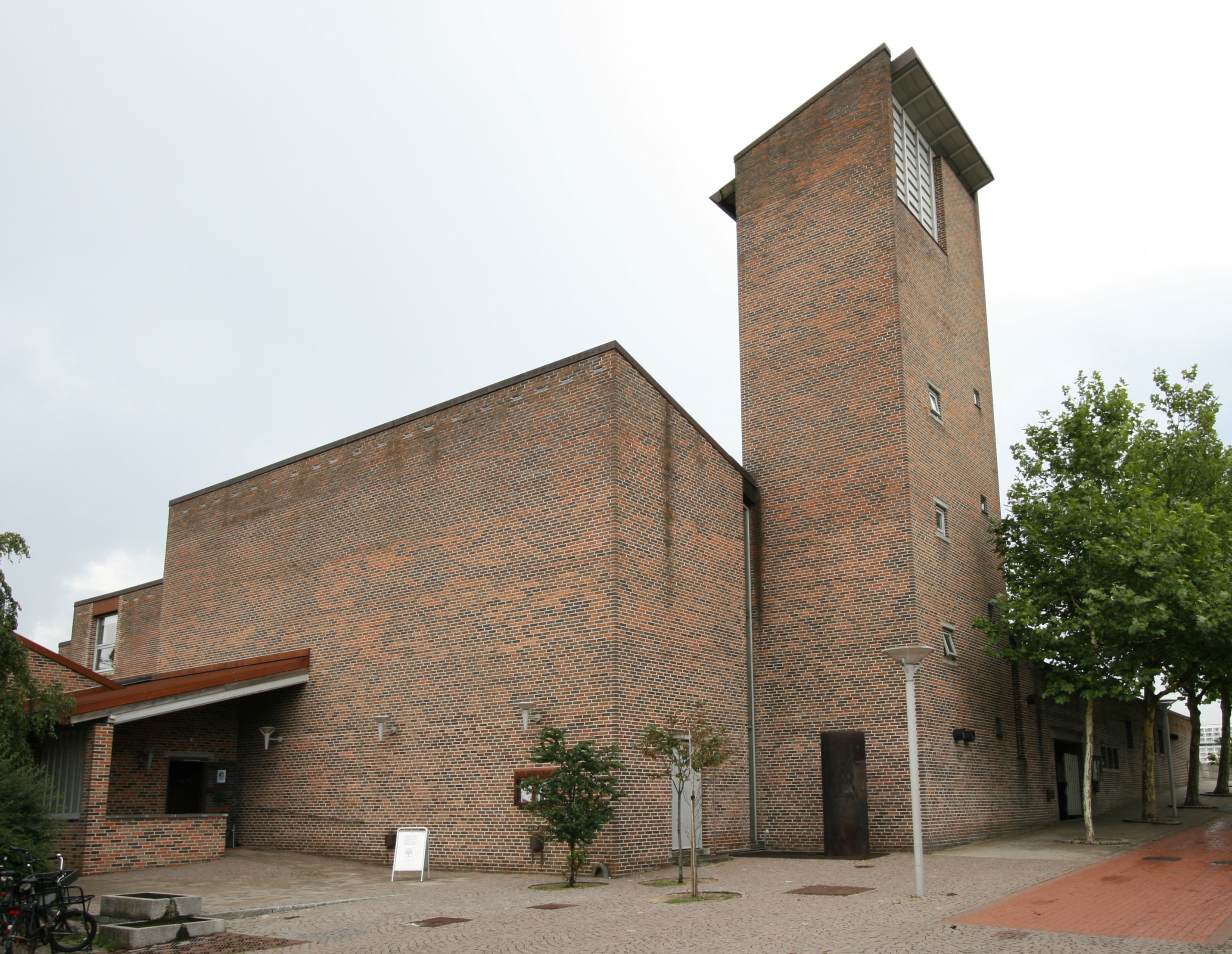 Avedøre Kirke, Copenhagen County, Denmark.